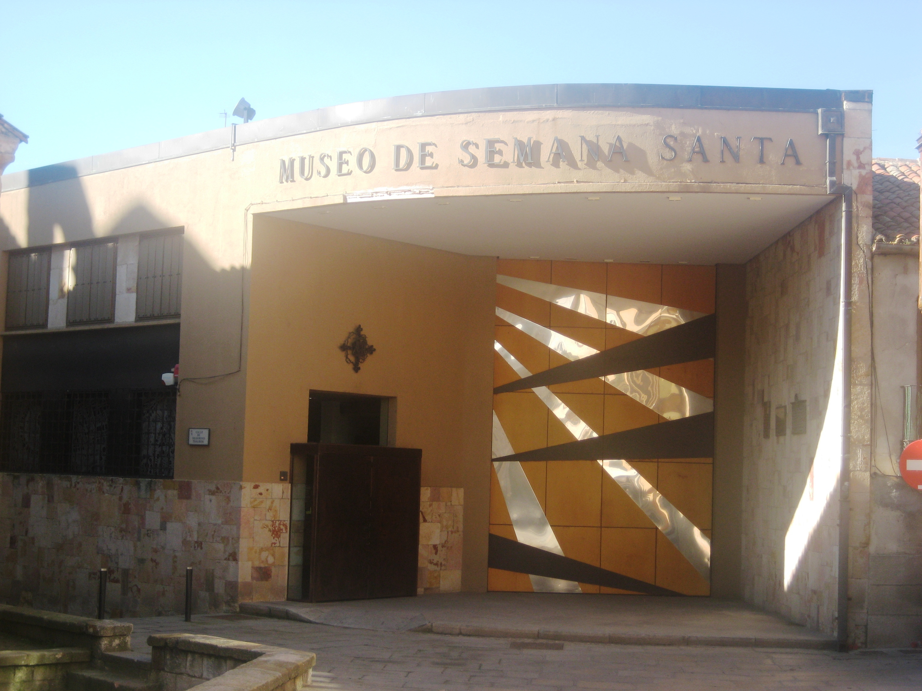 Fachada del Museo de Semana Santa de Zamora